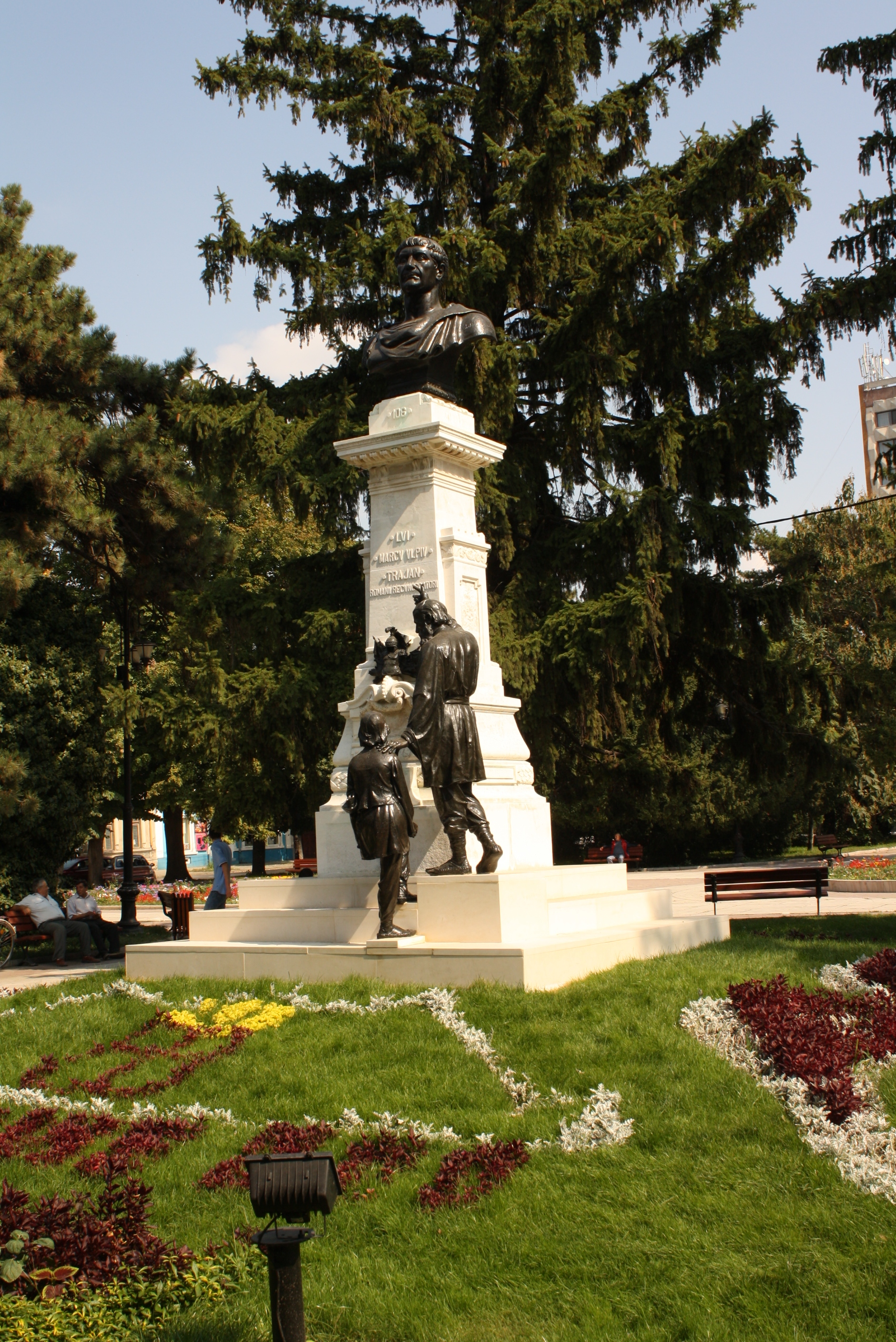 In parc - Grupul statuar " Traian" 1904 -1906